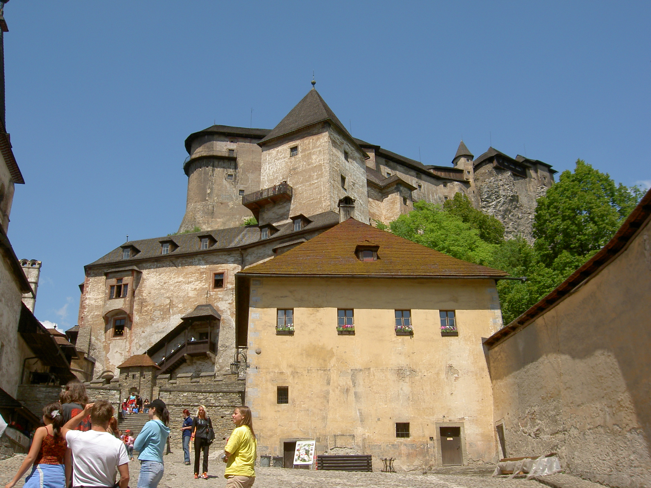 Oravský hrad